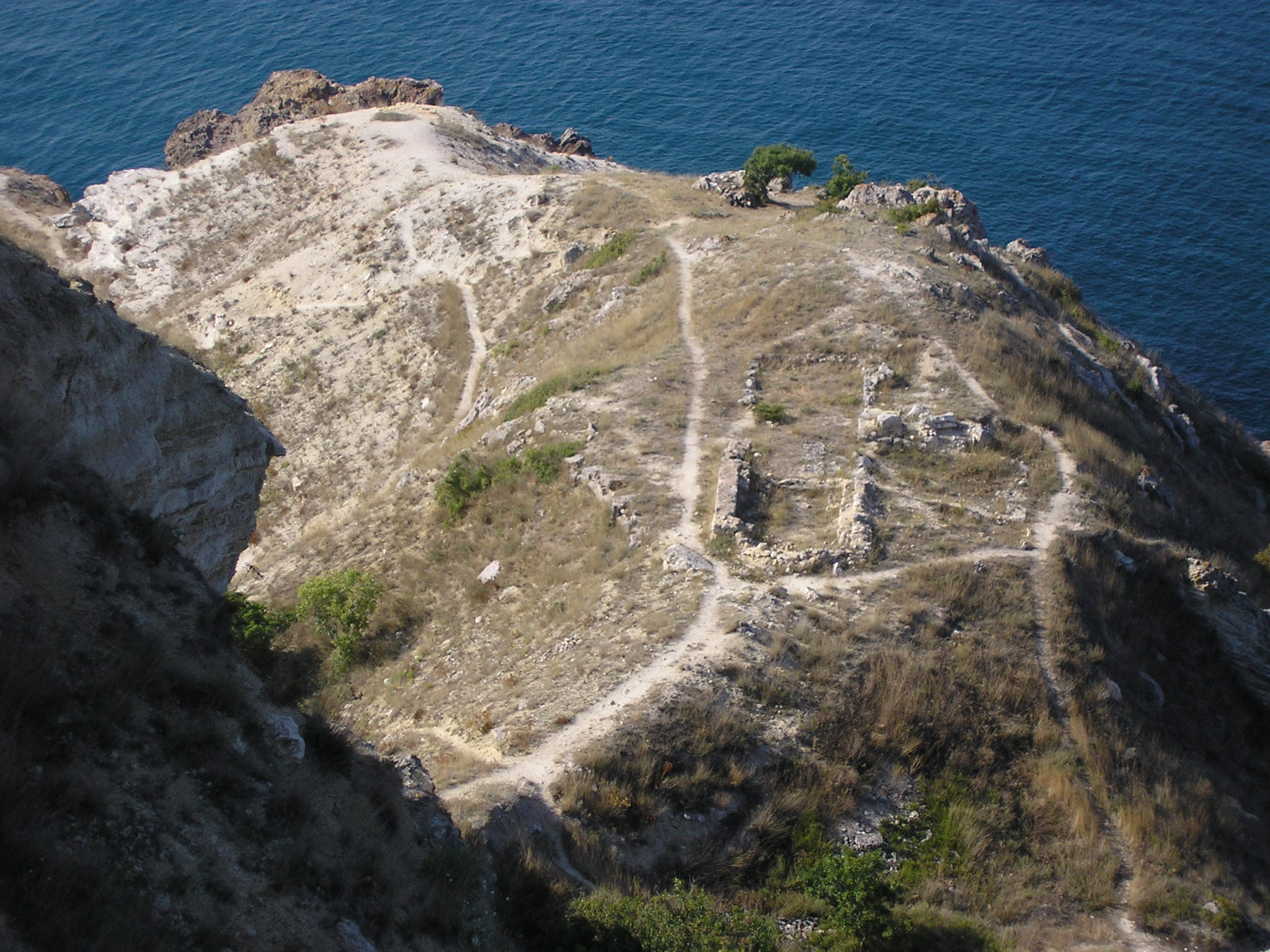 Мис Фіолент, Розташована у адміністративних межах м. Севастополя (Балаклавський район) на південному краю Гераклейського півострова (мис Фіолент), у 12 км на південний захід від мису Херсонес